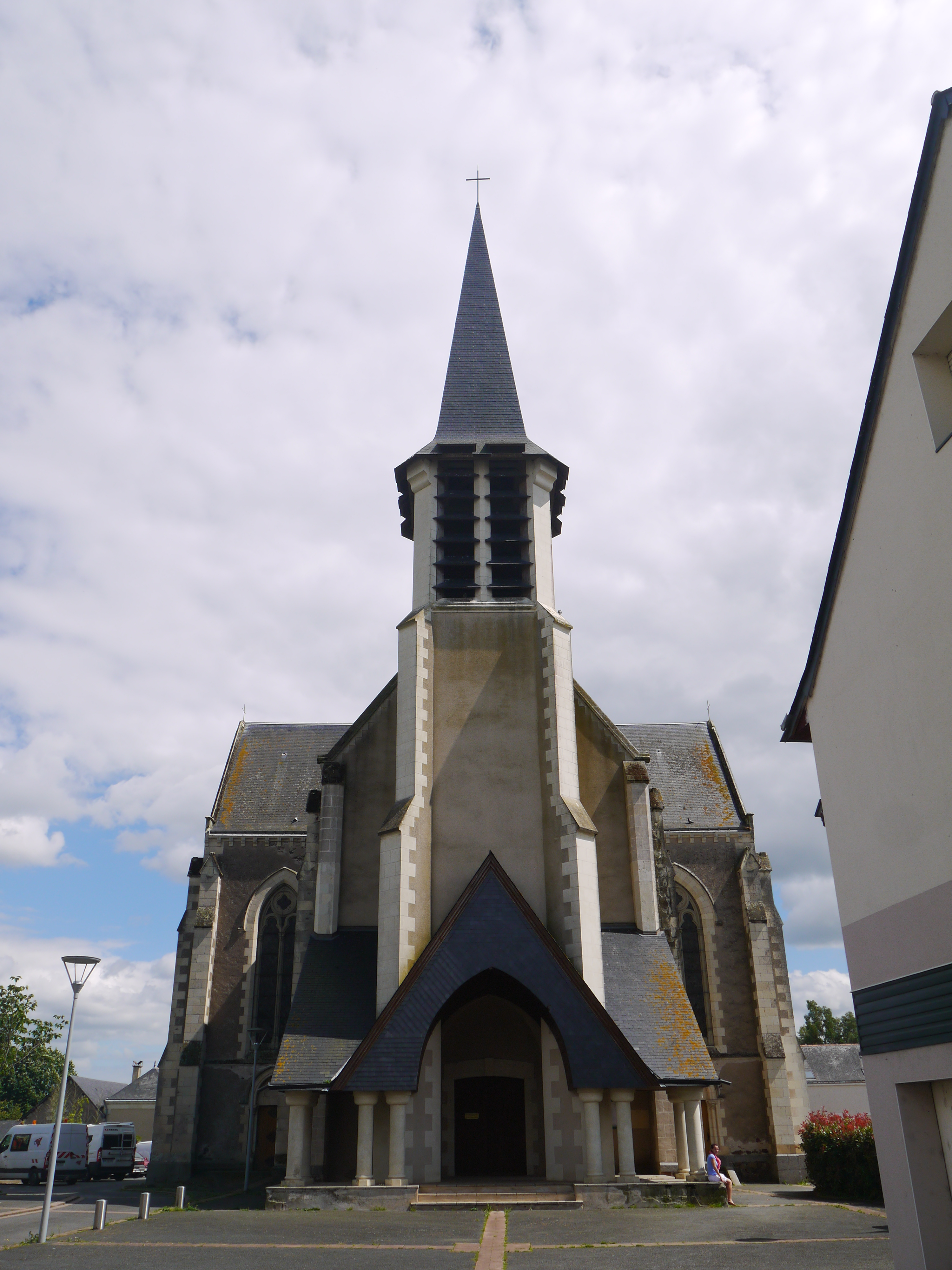 L'église Saint-Samson.